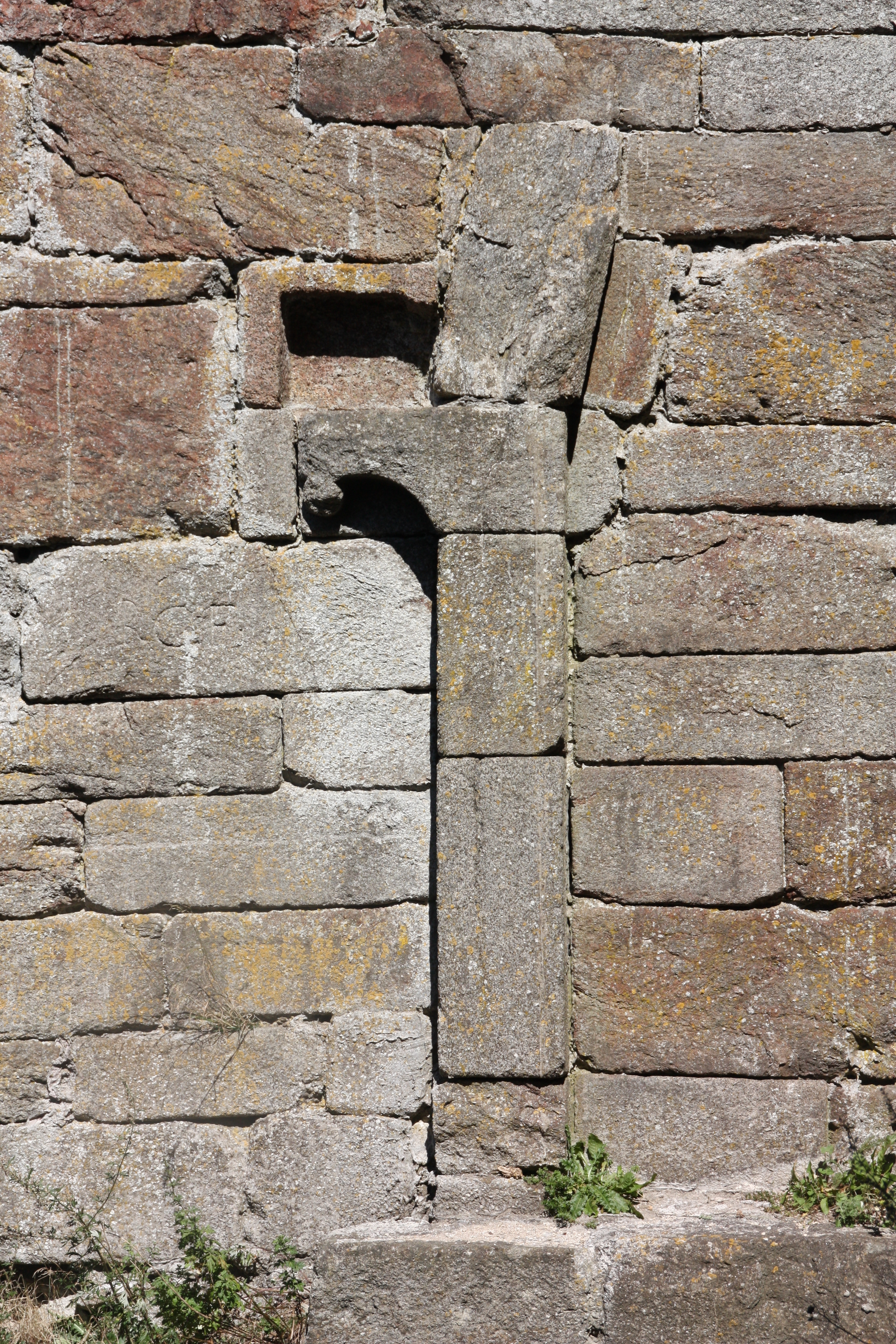 Burg Přimda, Westböhmen, Tschechische Republik. Romanische Kaminwange an der Nordwand des 1. OG.